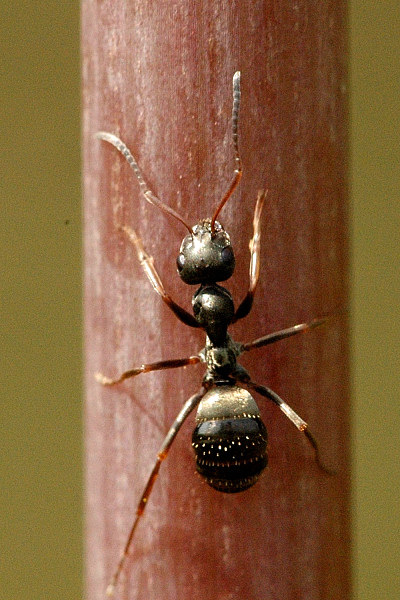 Lasius niger from Commanster, Belgian High Ardennes .